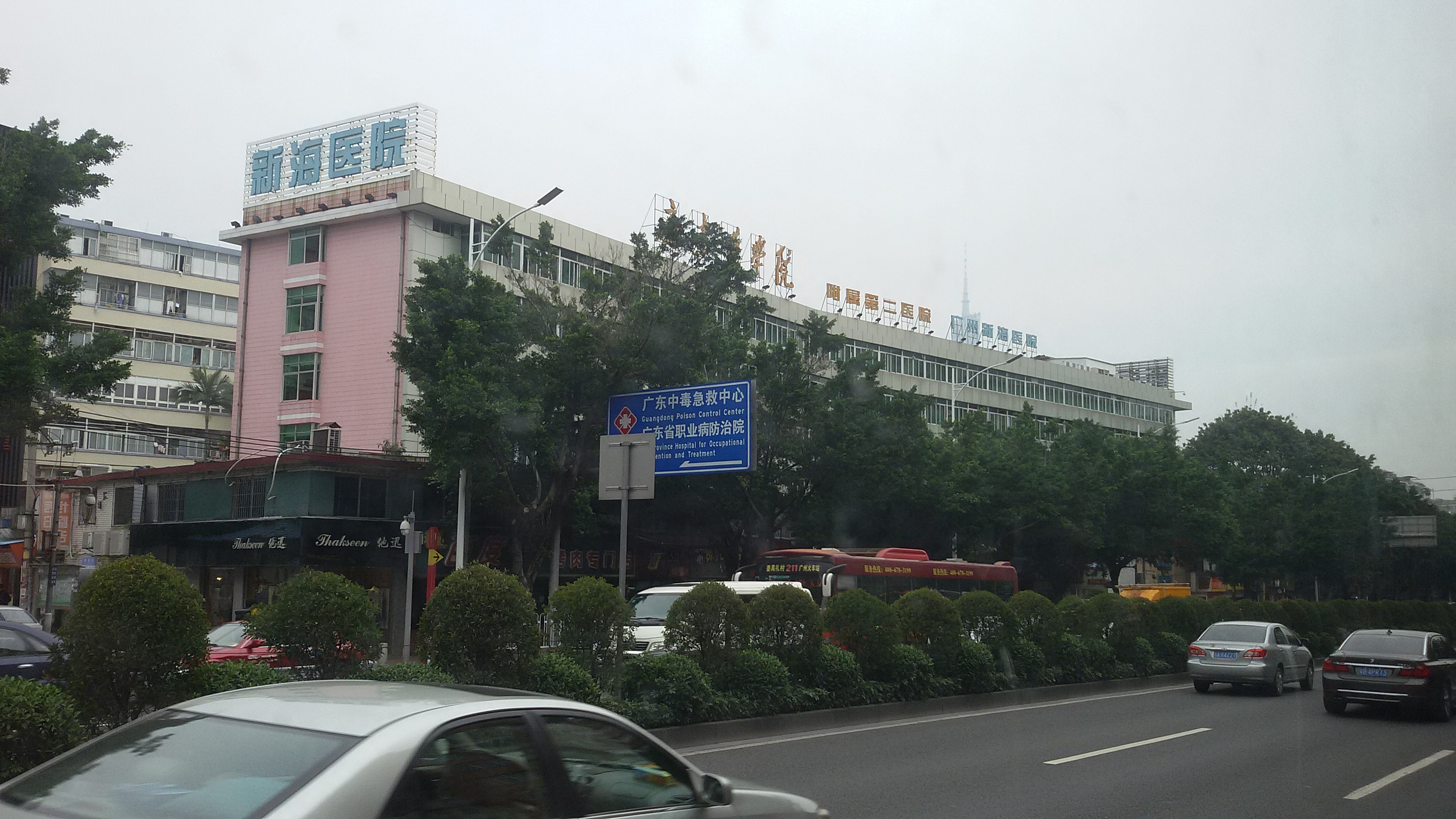 粵語: 廣東藥學院附屬第二醫院